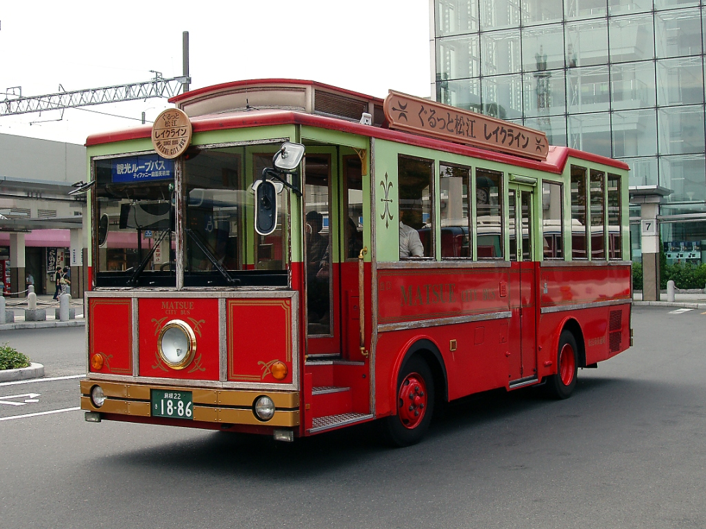 事業者: 松江市交通局 陸運登録: 島根22き18-86 シャーシ: 日野自動車 KC-RR1JGAA 車体: 東京特殊車体 年式: 1997年 撮影場所: JR松江駅前